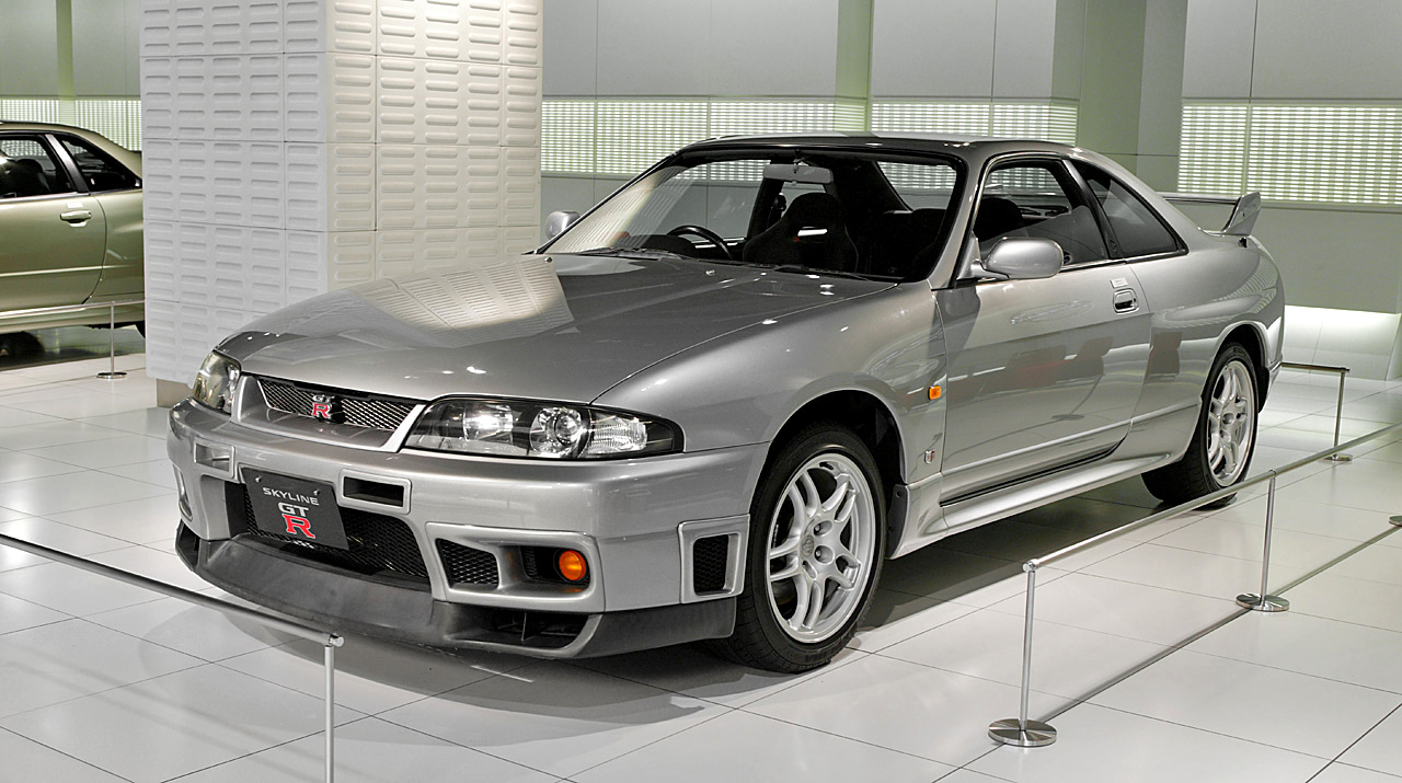 Nissan Skyline R33 GT-R, in Nissan Ginza Gallery.